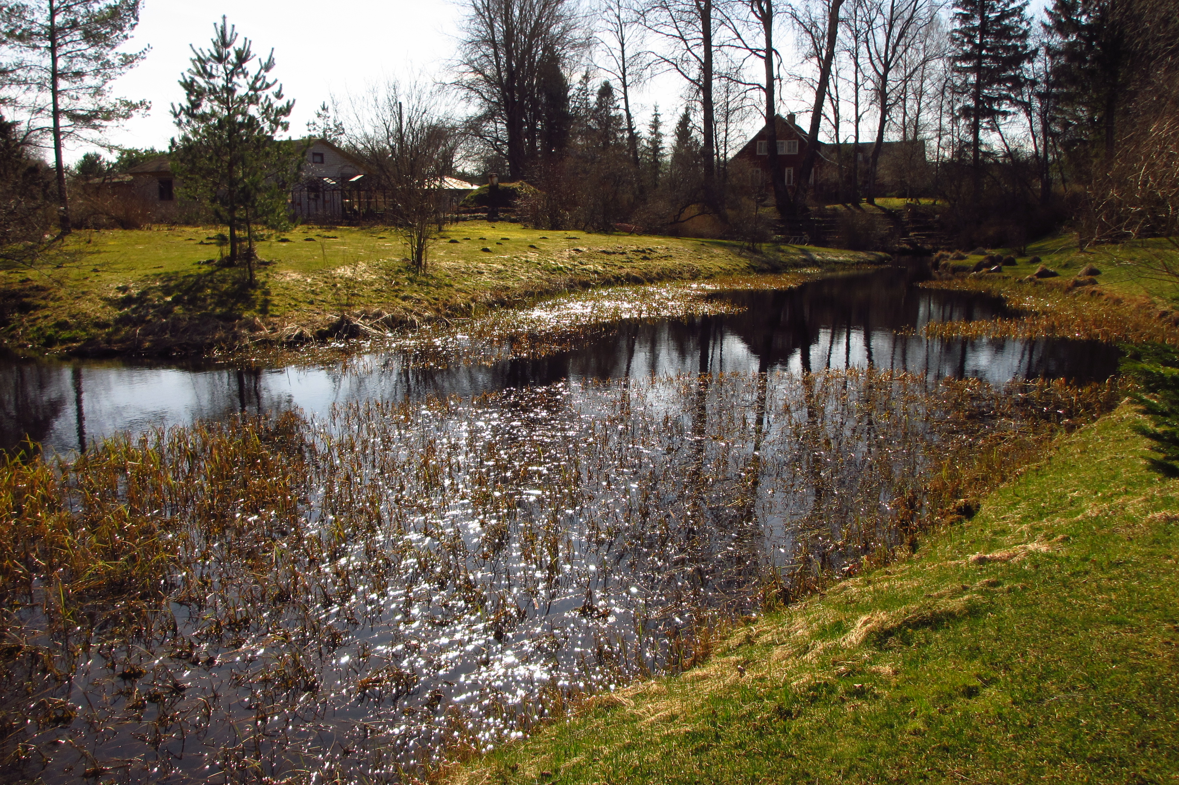 Lohu allikad